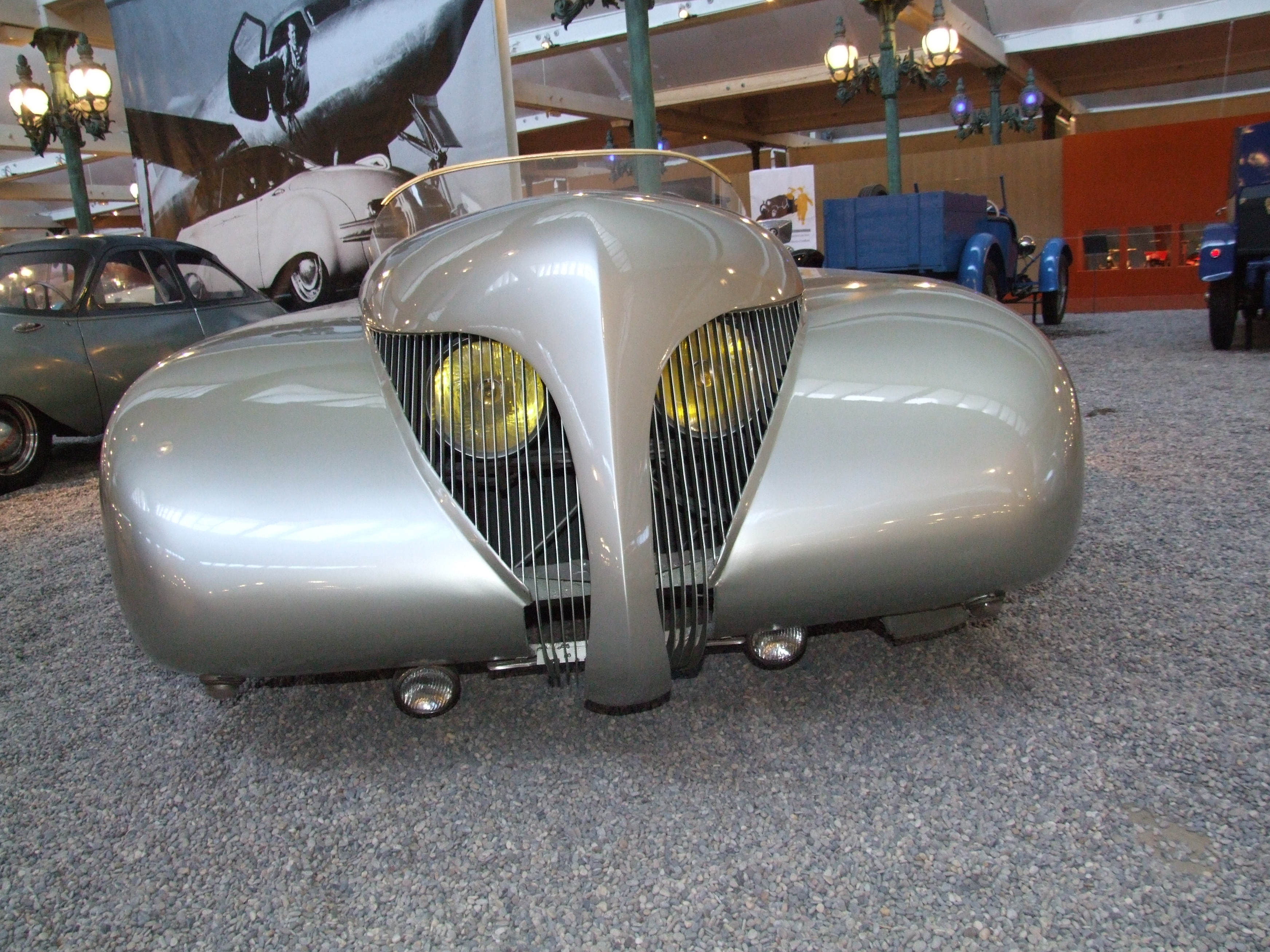 Paul Arzens La Baleine, Frontansicht, Cité de l’Automobile – Musée National – Collection Schlumpf, Mülhausen, Frankreich